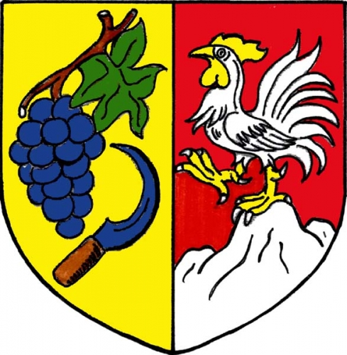 znak,Skalice , okres Znojmo